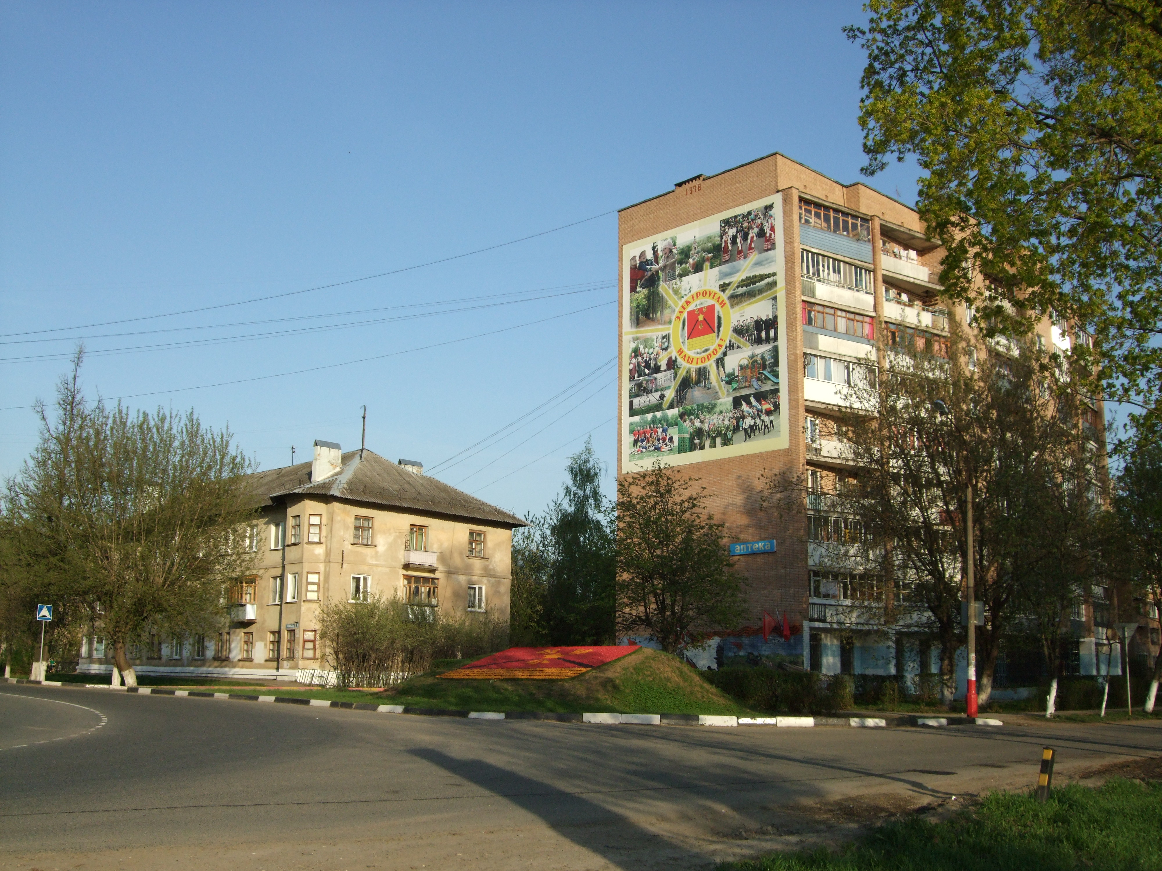 Город Электроугли